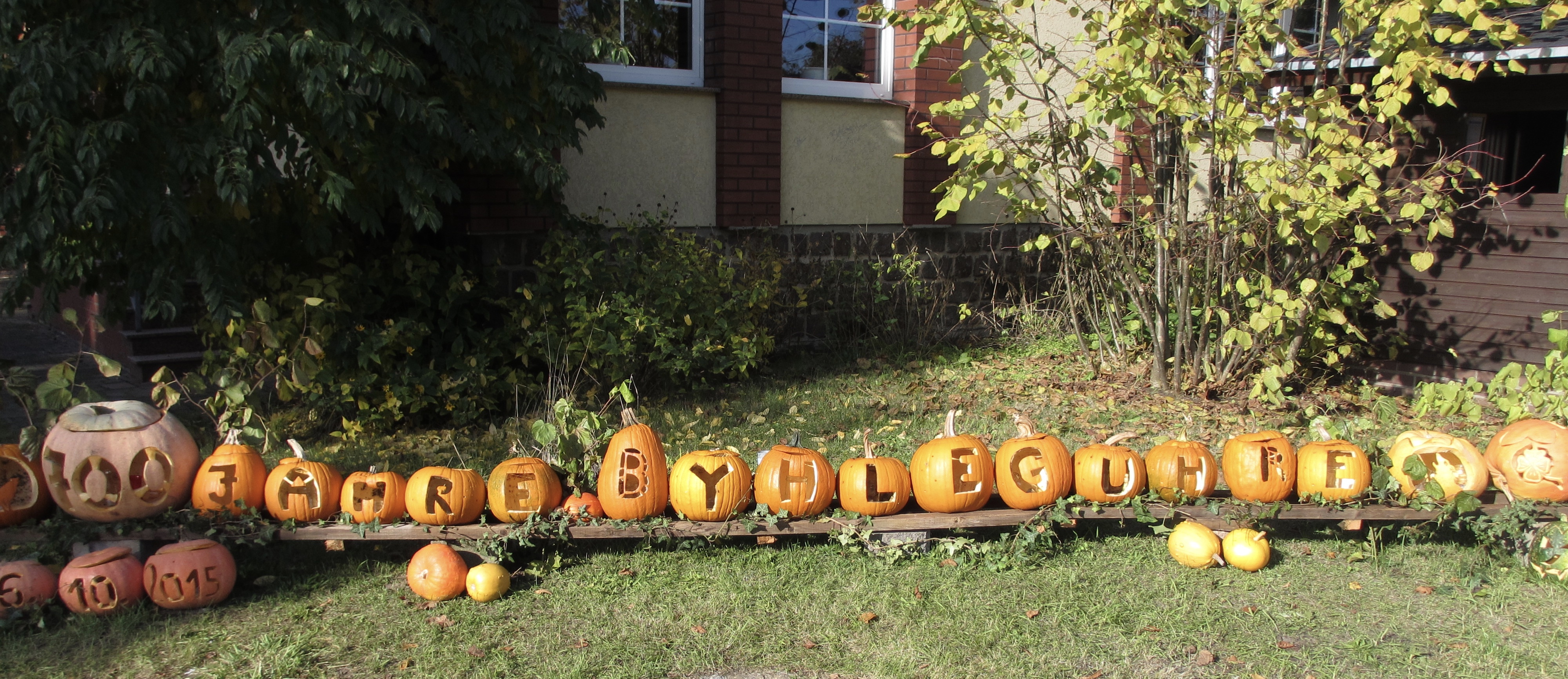 Kürbisfest zum 700. Dorfjubiläum 2015